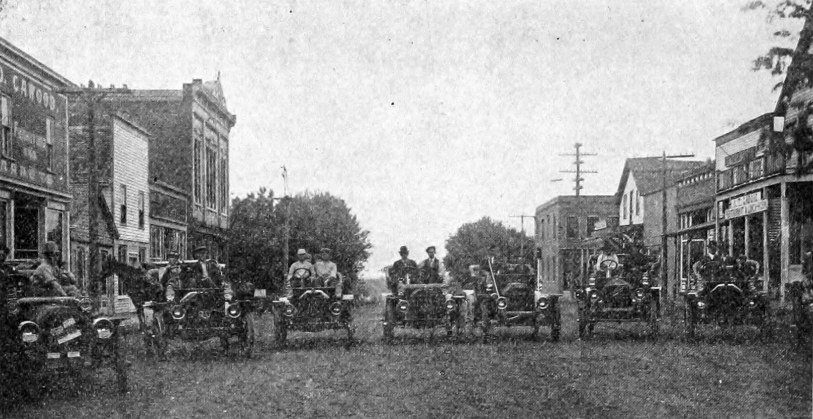 Wetmore, Kansas.